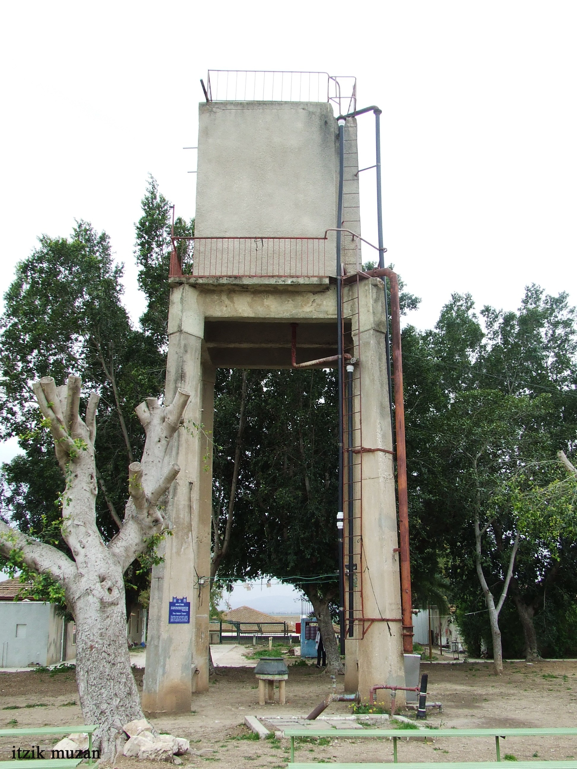 חצר הקואופרציה בקיבוץ מרחביה